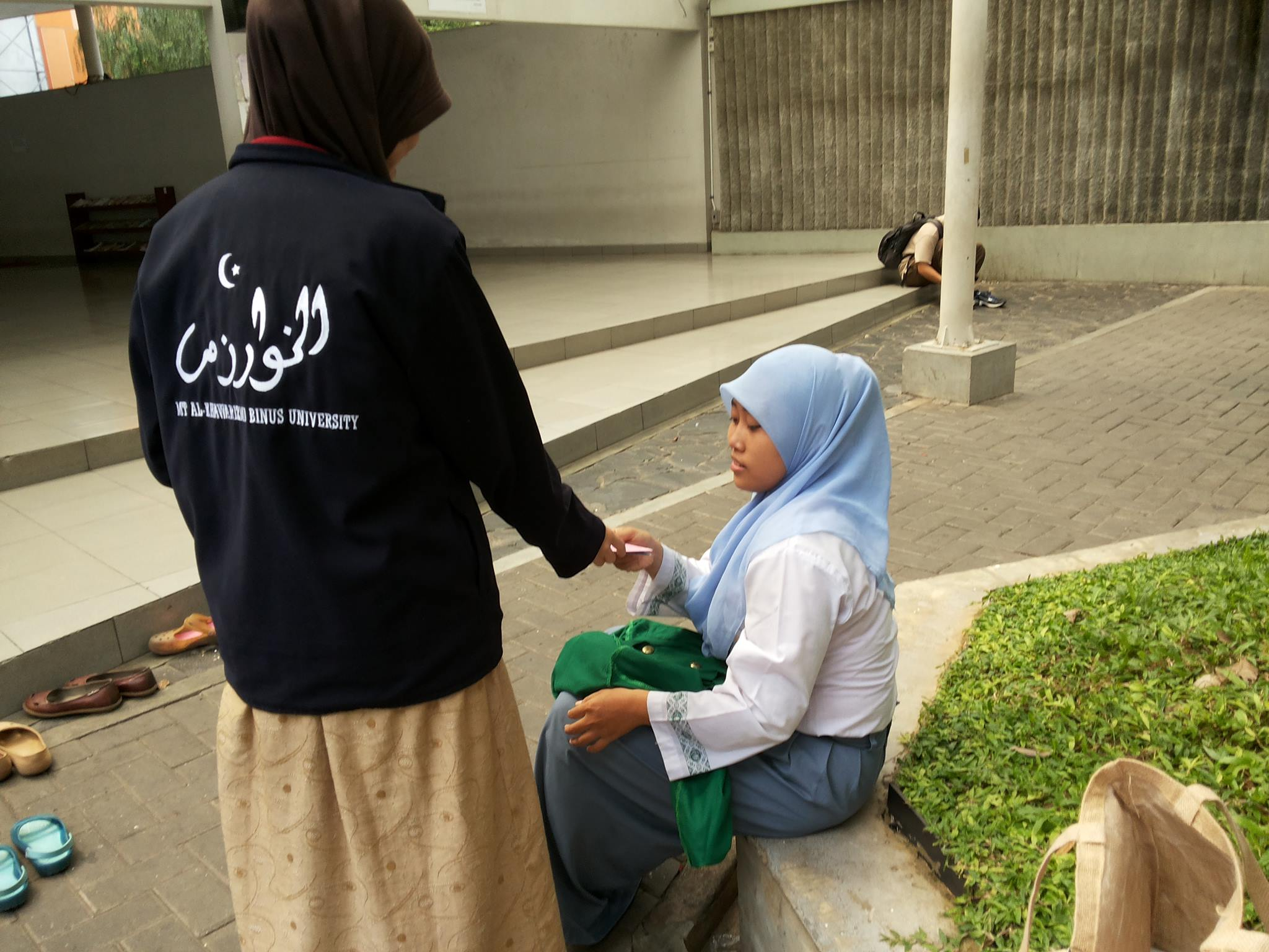 contoh komunikasi persuasi